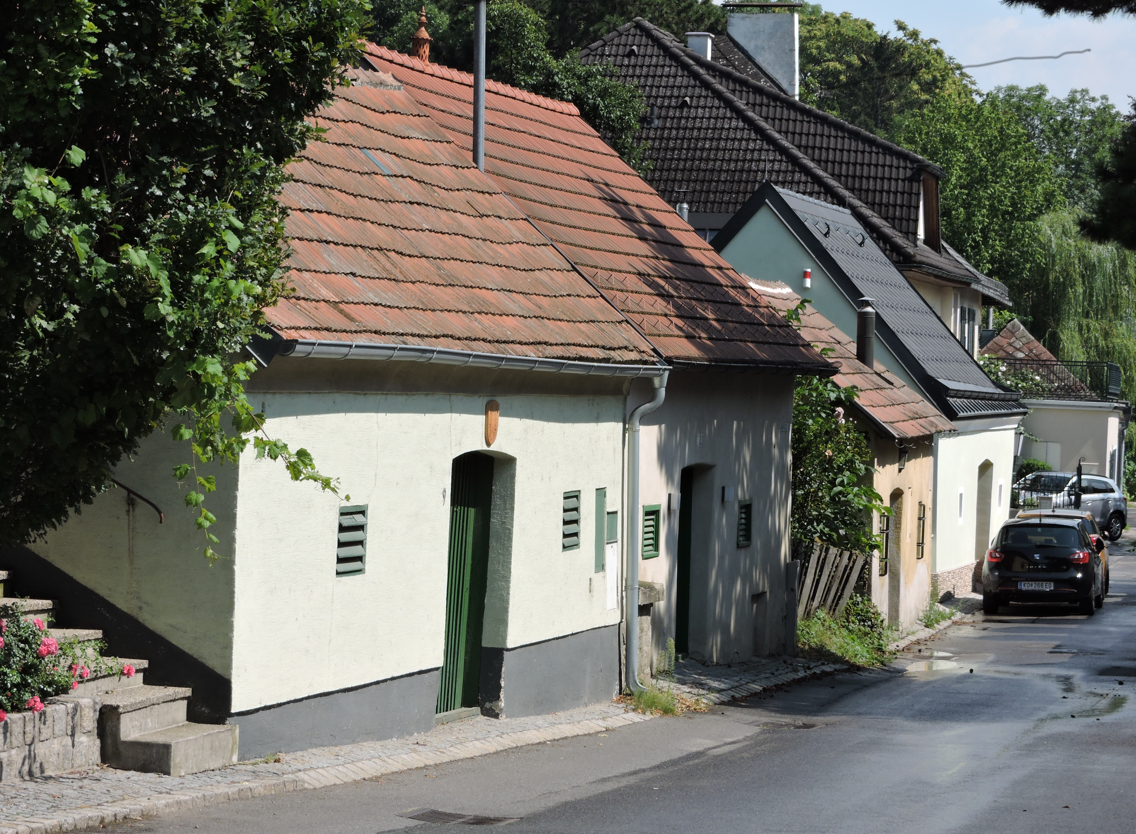 Langenzersdorfer Kellergasse, Westseite. Blick auf die Einzelkeller 9 - 15.